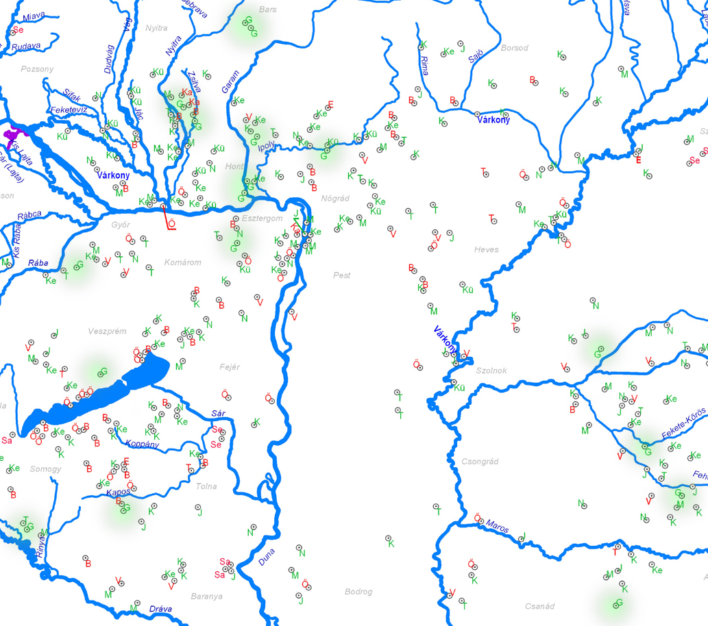 A gyarmat törzsnév elterjedése a Kárpát-medencében